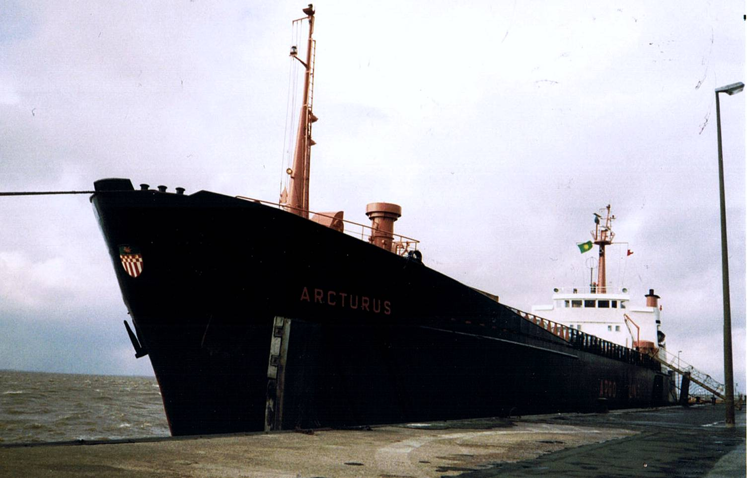 Das RoRo-Schiff Acturus in Bremerhaven